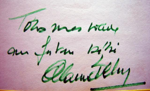 Dédicace pour la future naissance d'une petite fille qui s'appellera ALEXIA.